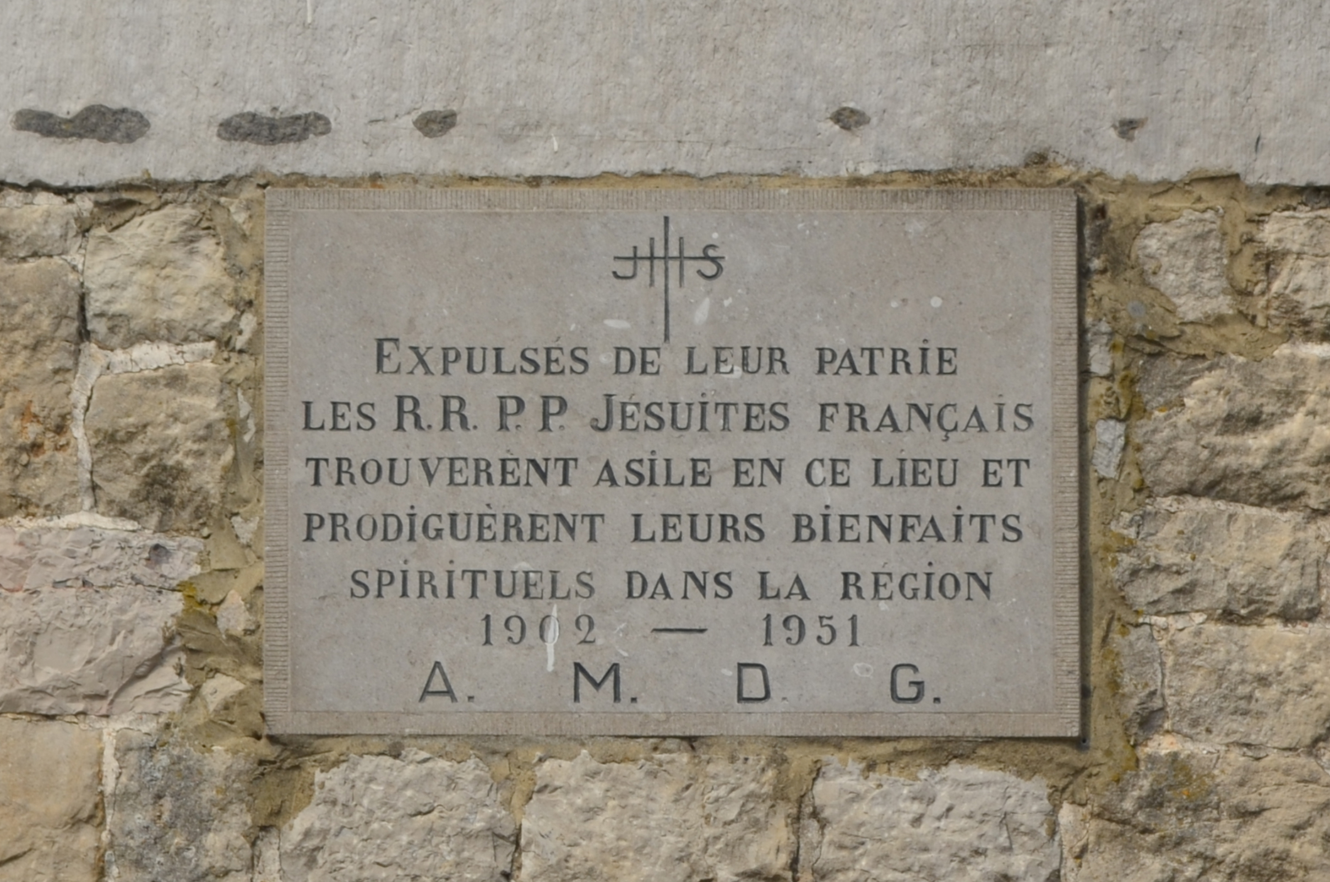 Florennes (Belgique) - plaque commémorative placée sur une tour du château de Florennes en mémoire des Compagnie de Jésus français.Texte : « Expulsés de leur patrie les R.R. P.P. Jésuites français trouverènt [sic] asile en ce lieu et prodiguèrent leurs bienfaits spirituels dans la région 1902 - 1951 A. M. D. G.»